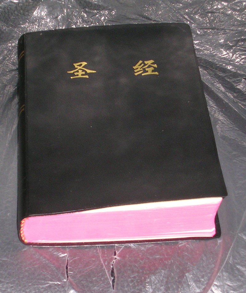 本图由 Moses 亲手制作, Moses 愿意在GNU自由文档许可证下发布本图像 - Moses ✍ 17:28 2005年5月3日 (UTC)